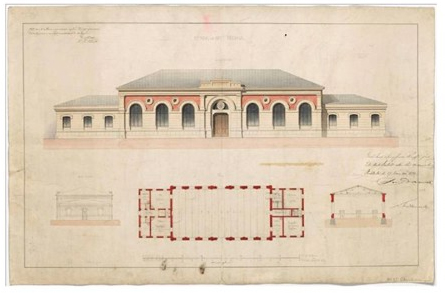 Tullhuset, Blasieholmen, ritning av Axel Nyström